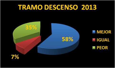 estadisticas